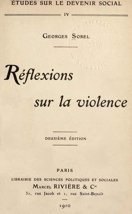 Georges Sorel, "Réflexions sur la violence", couverture, 1910.